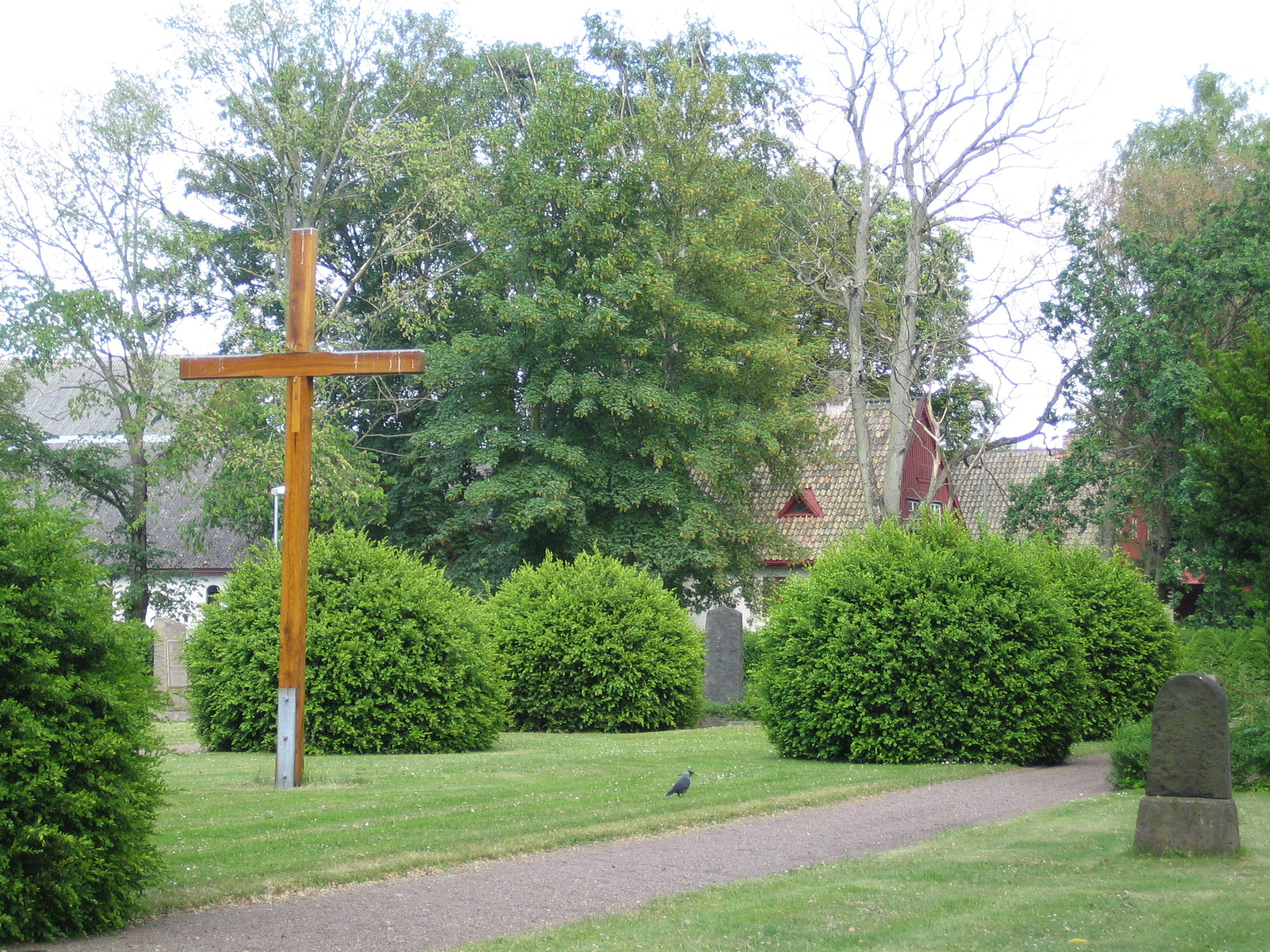 Former church site in Hyllieby, Malmö, Sweden.